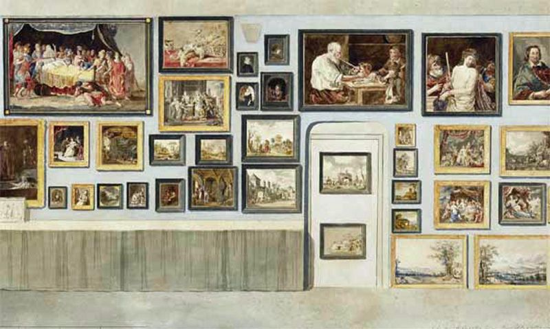 Aquarell eines Teiles der Gemäldesammlung von Gottfried Winckler